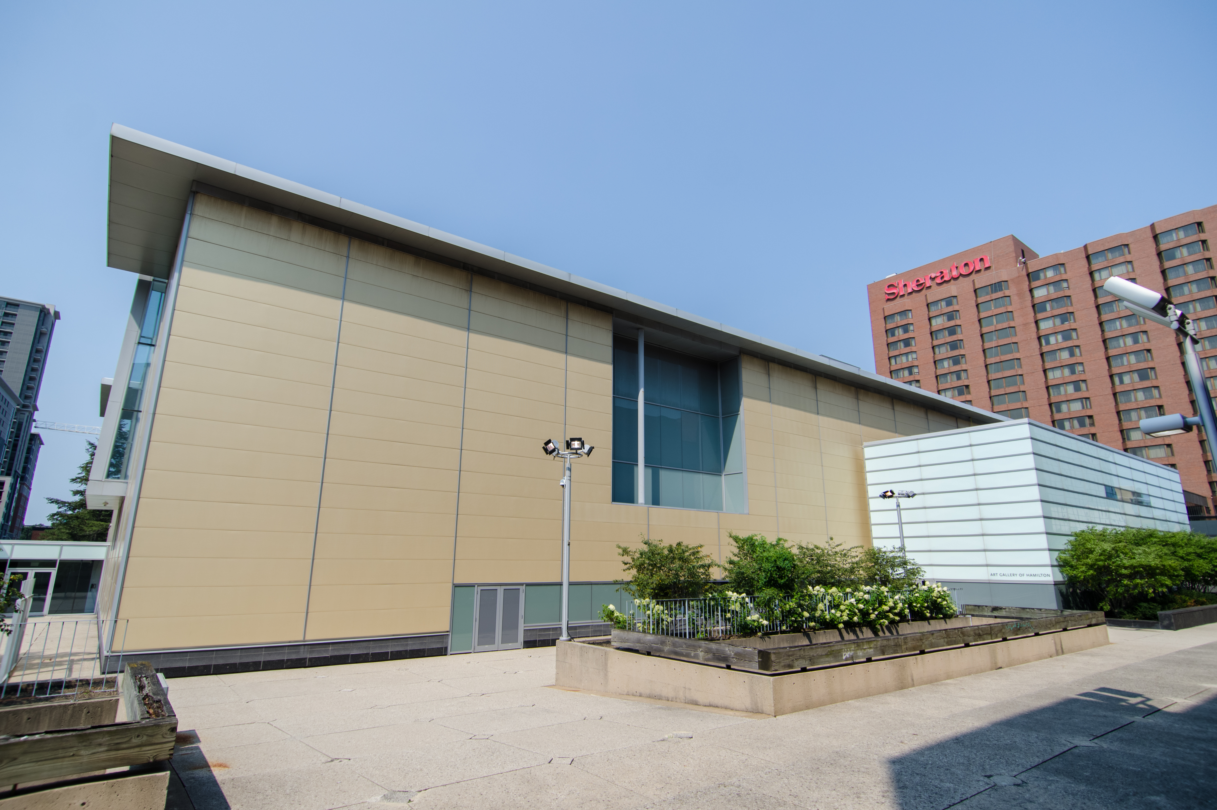 Seen in Dark Matter episode #108.